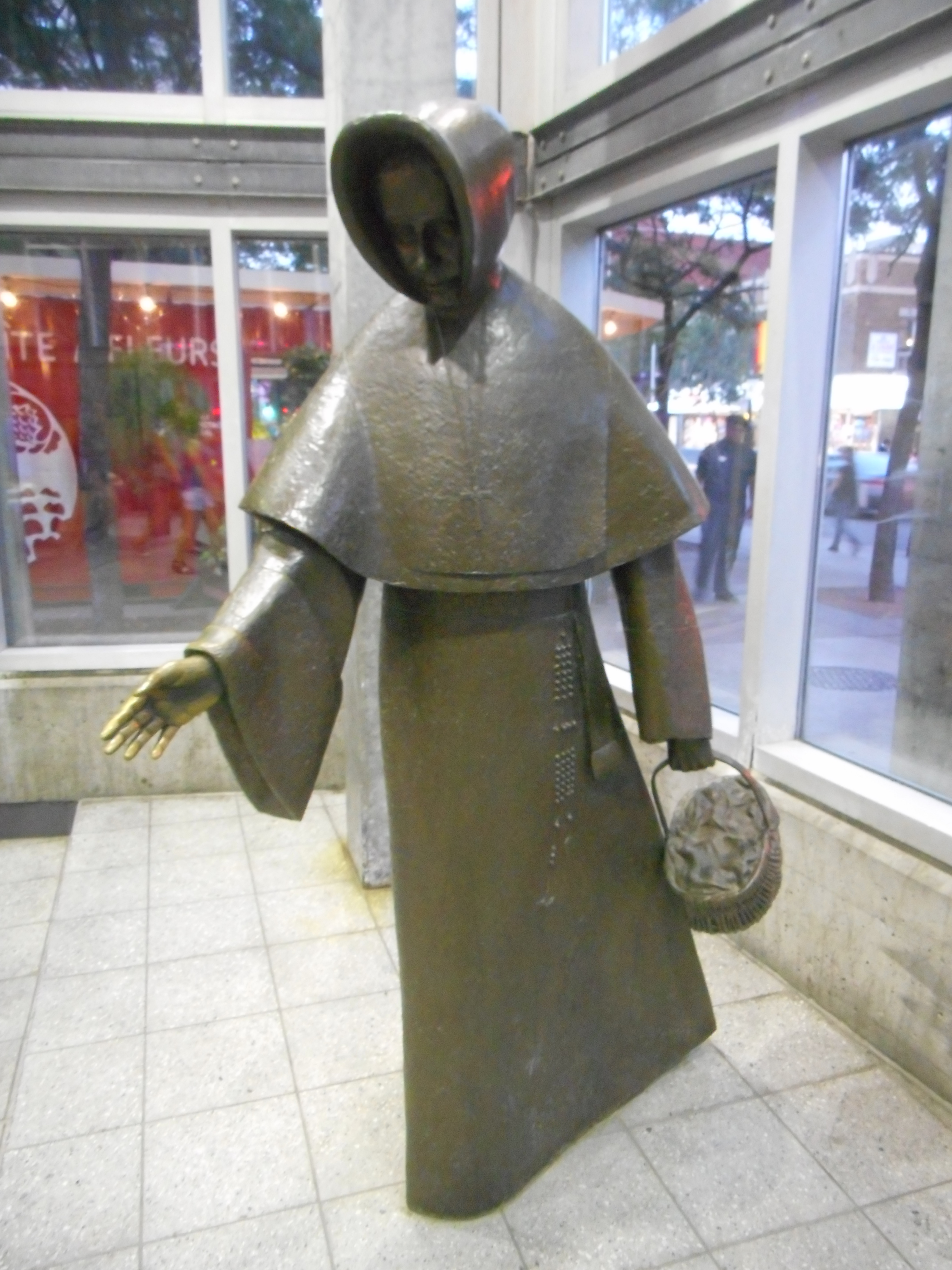 Mère Émilie Gamelin, sculpture de Raoul Hunter, située à la station de métro Berri-UQAM à Montréal.